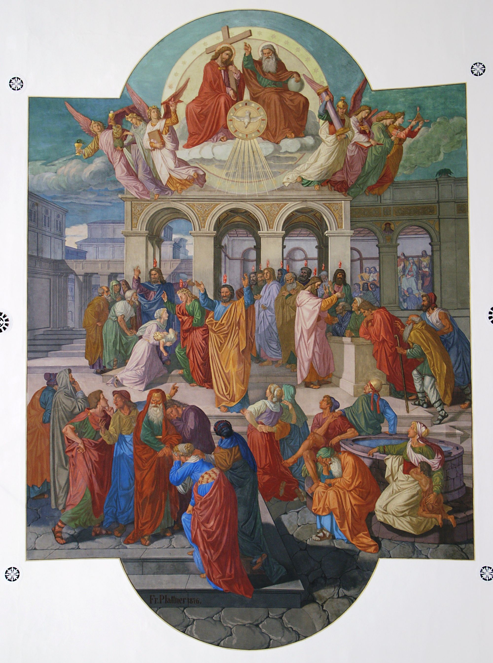 Deckenbild